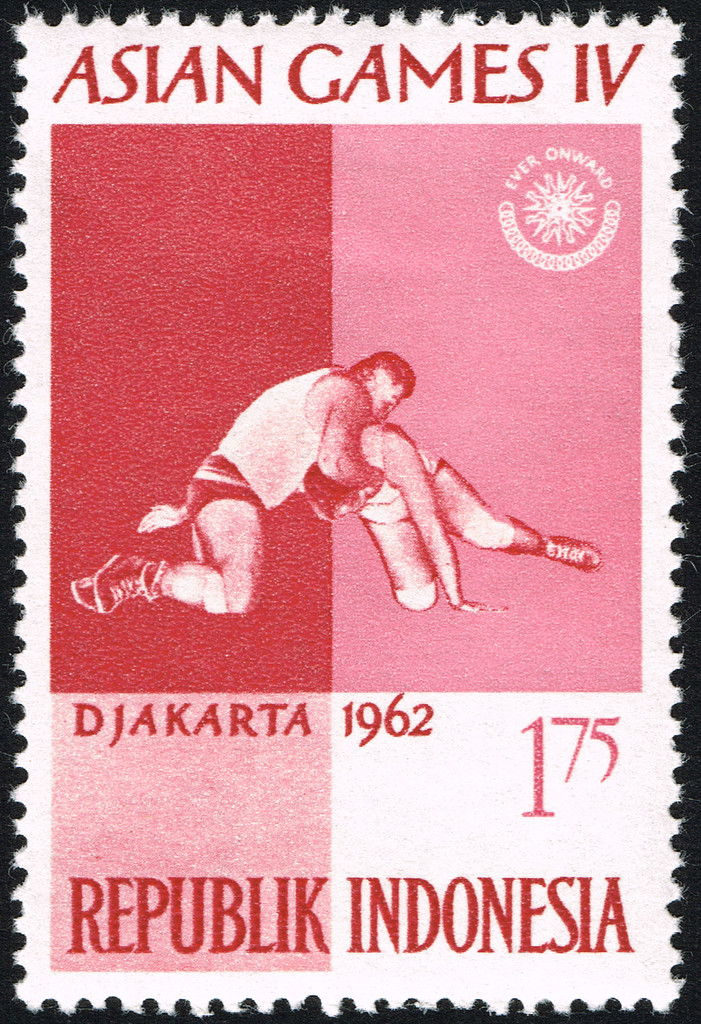 Asian Games IV